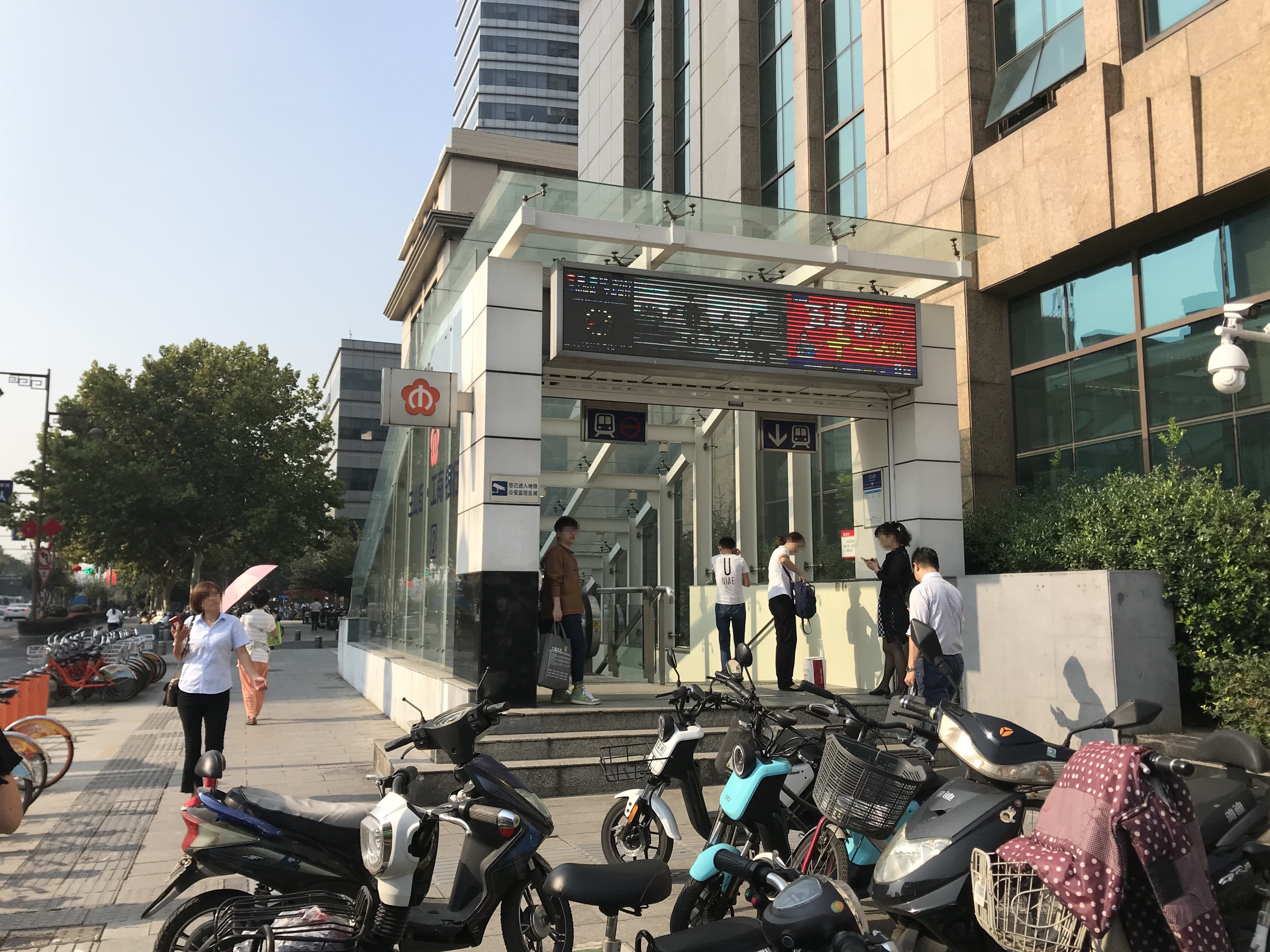 三山街駅の2番出入り口